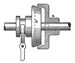 Kegelkuppelung.